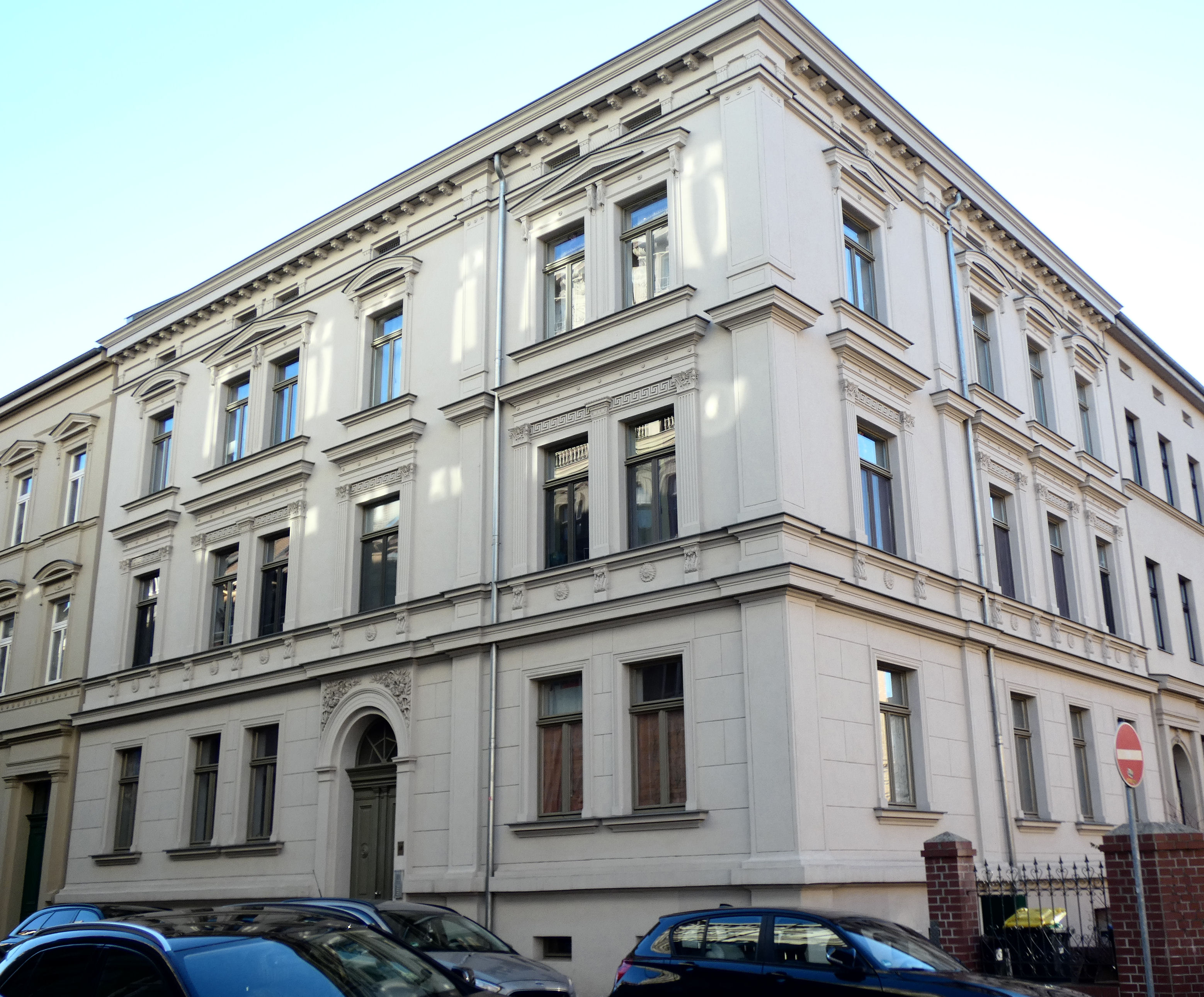 Laurentiusstraße 10, Halle (Saale)